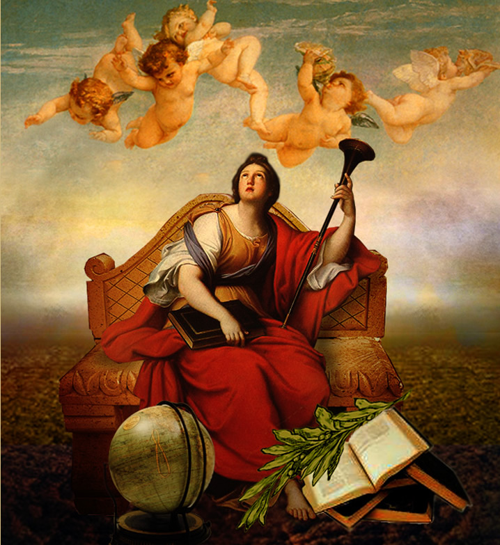 ? × ? cm